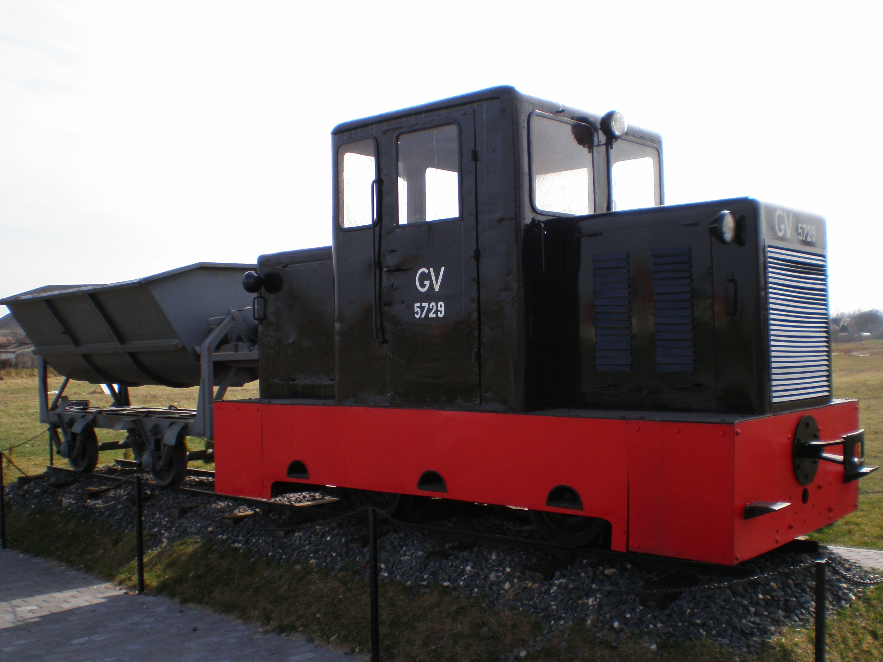 Dunaszeg határában kiállított C50-es típusú mozdony (Dunaszeg, Győr-Moson-Sopron megye, Magyarország)